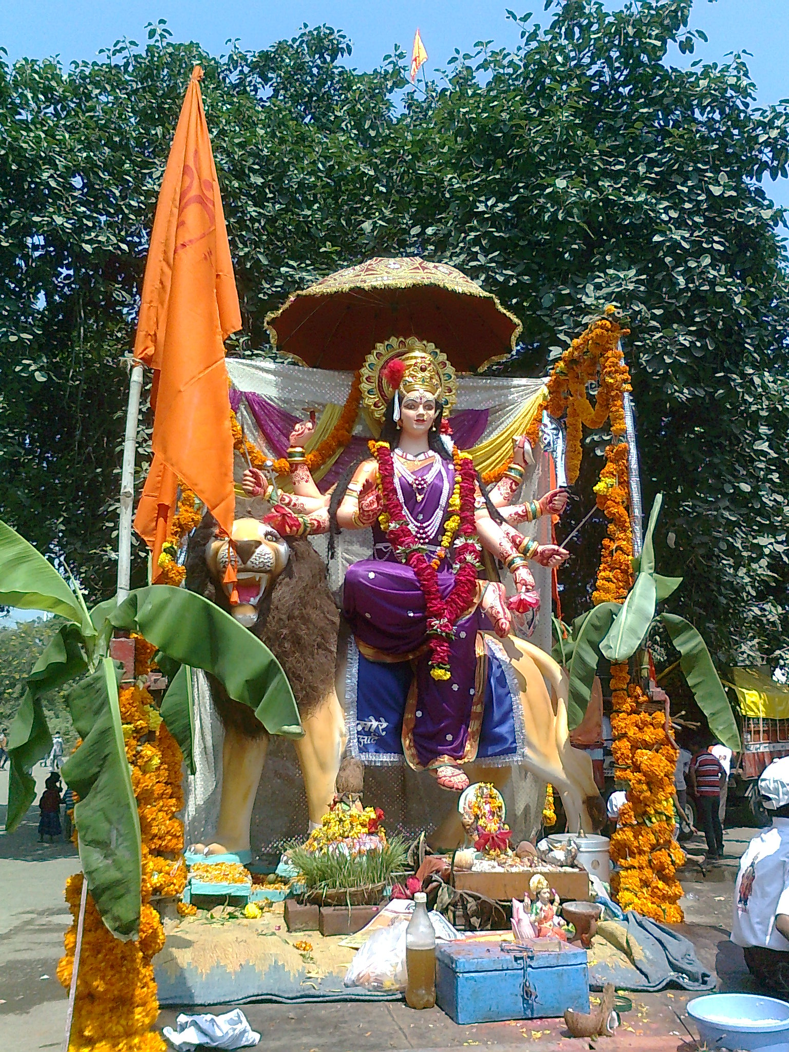 Durga visarjan at Chinawal village, India